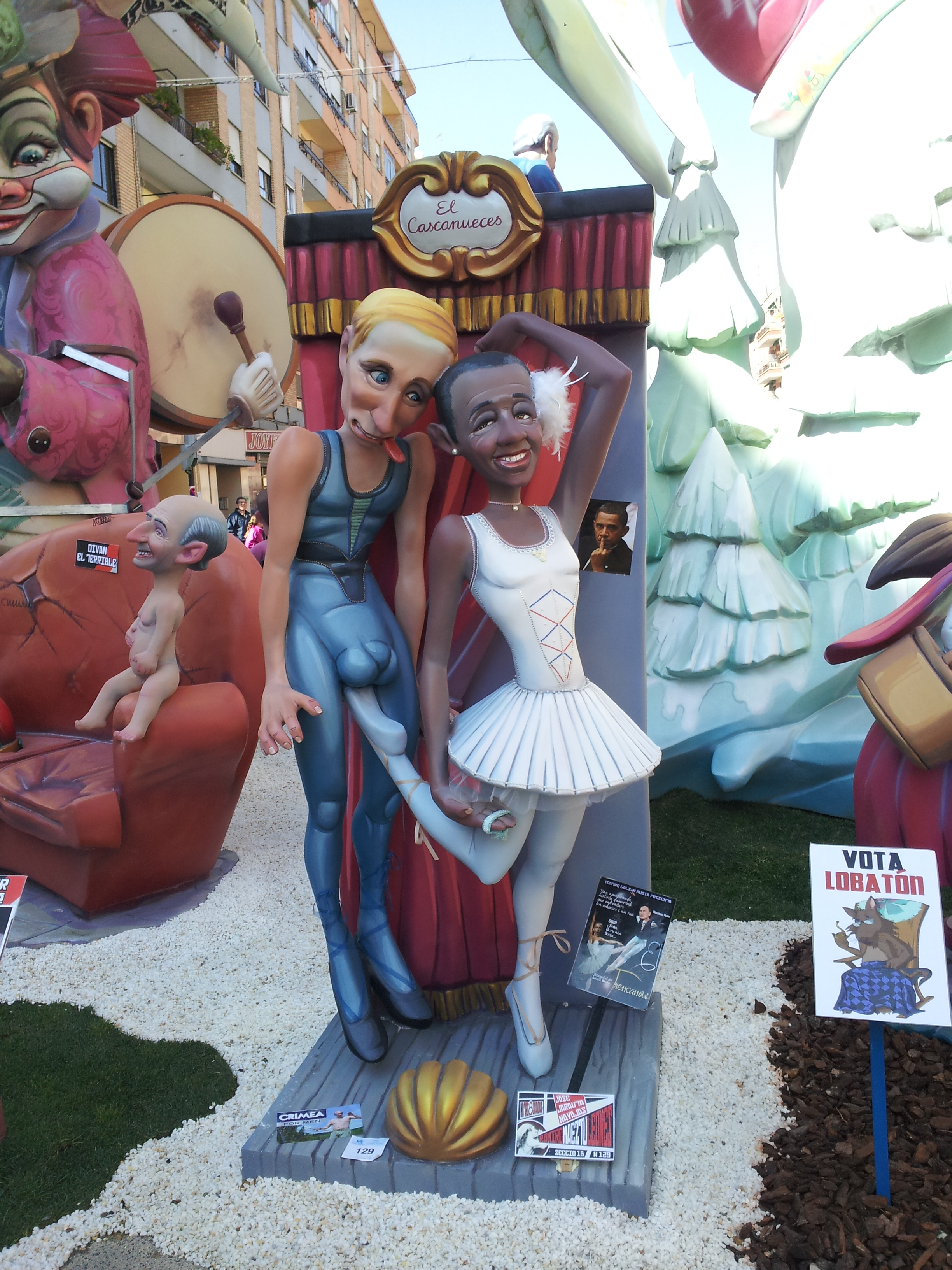 Escenes de la falla